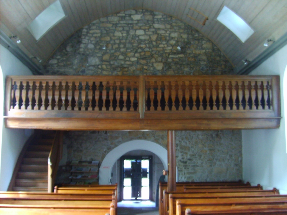 Pfarrkirche Schöller, Wuppertal, Germany; Blick auf Empore